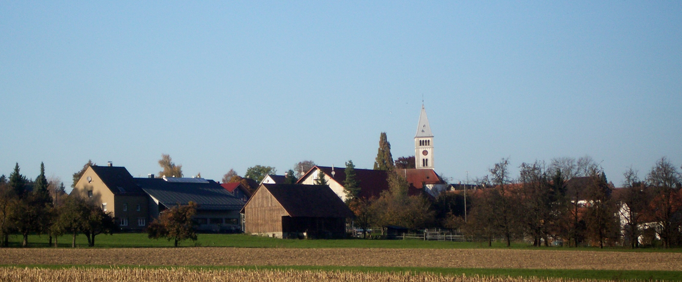 Ravensburg, Ortschaft Taldorf: Blick von Süden auf Bavendorf mit Pfarrkirche St. Columban